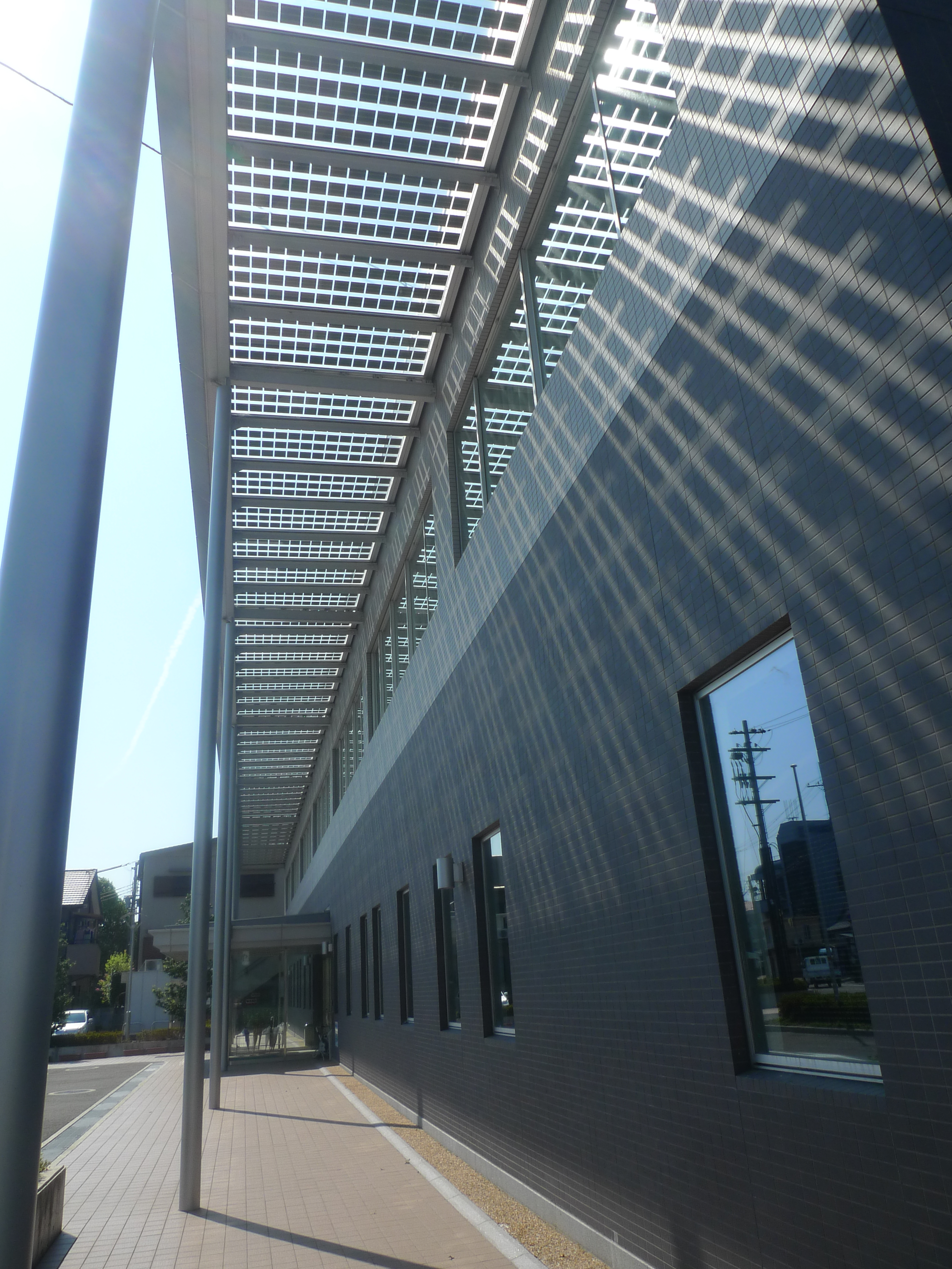 和歌山県海南市 下津行政局庁舎